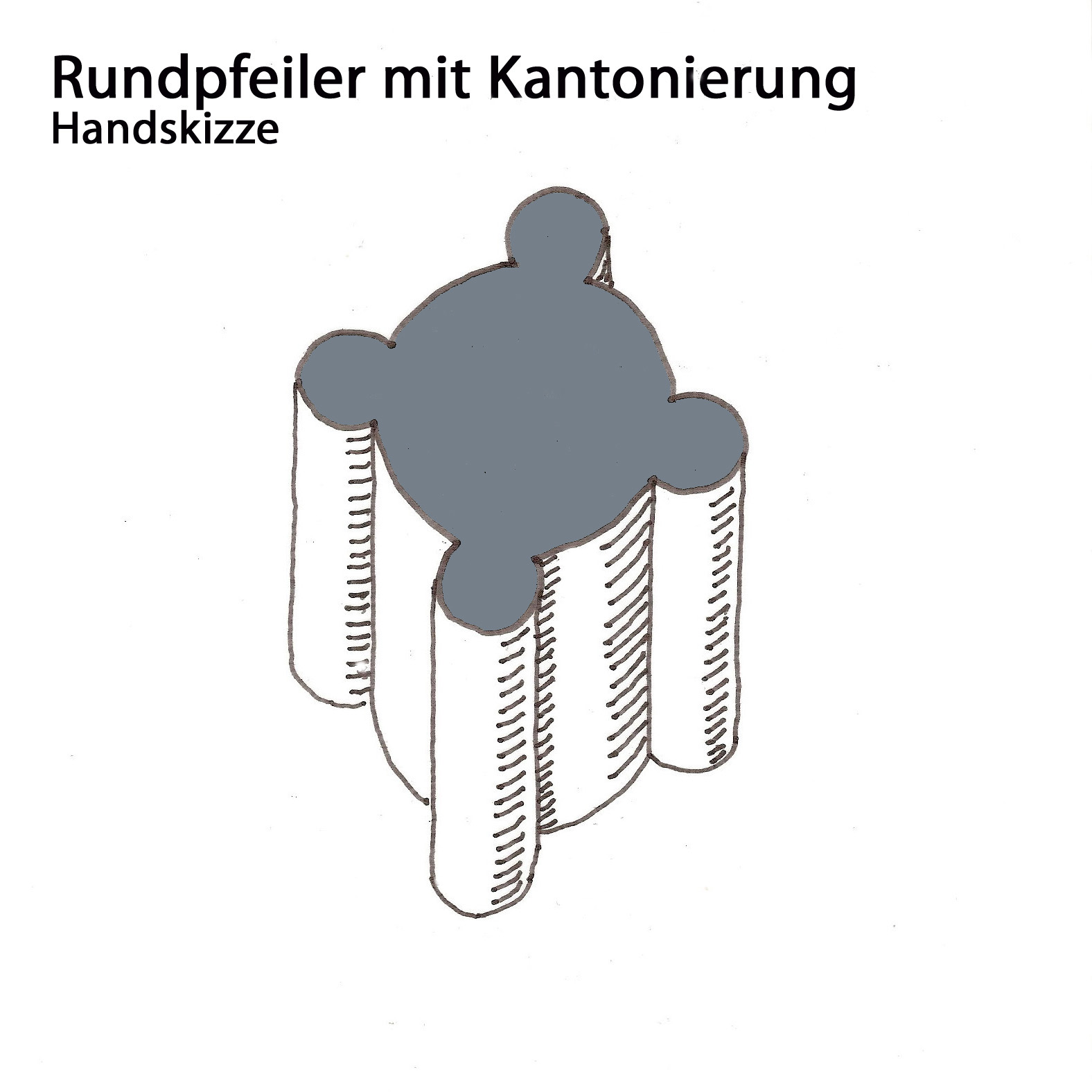 Rundpfeiler mit Kantonierung, Handskizze